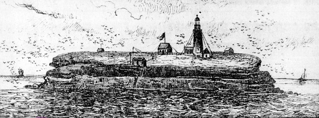 Le Phare du Rocher-aux-Oiseaux avec les cables pour le fixer au sol, installés en 1872.